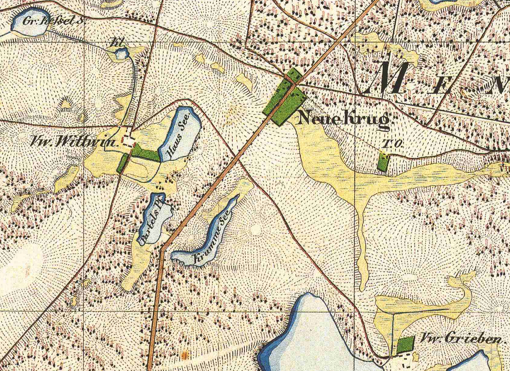 Beerenbusch Feldgrieben Gollinsofen Wittwien, Stadt Rheinsberg, Lkr. Ostprignitz-Ruppin, Brandenburg, Ausschnitt aus dem Urmesstischblatt 2843 Rheinsberg von 1825.